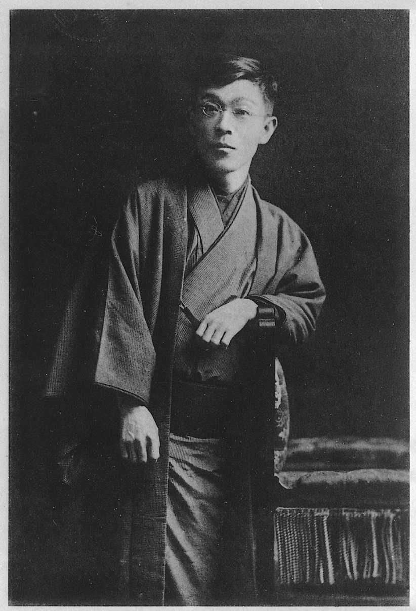 Portrait of Izumi Kyoka (泉鏡花, 1873 – 1939)